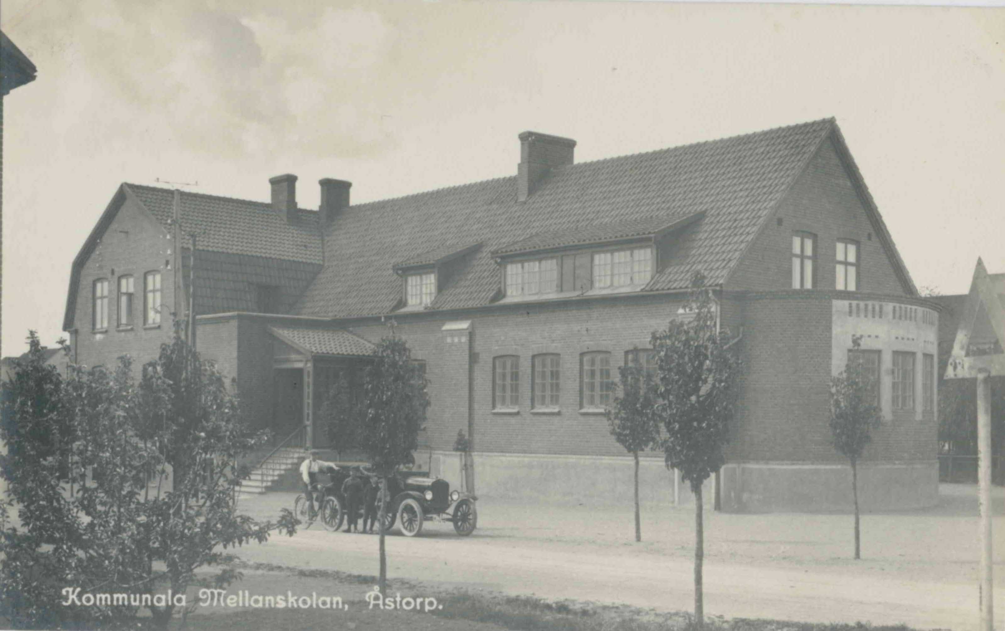 Kommunala Mellanskolan, Åstorp Förlag: Möllers Bokhandel